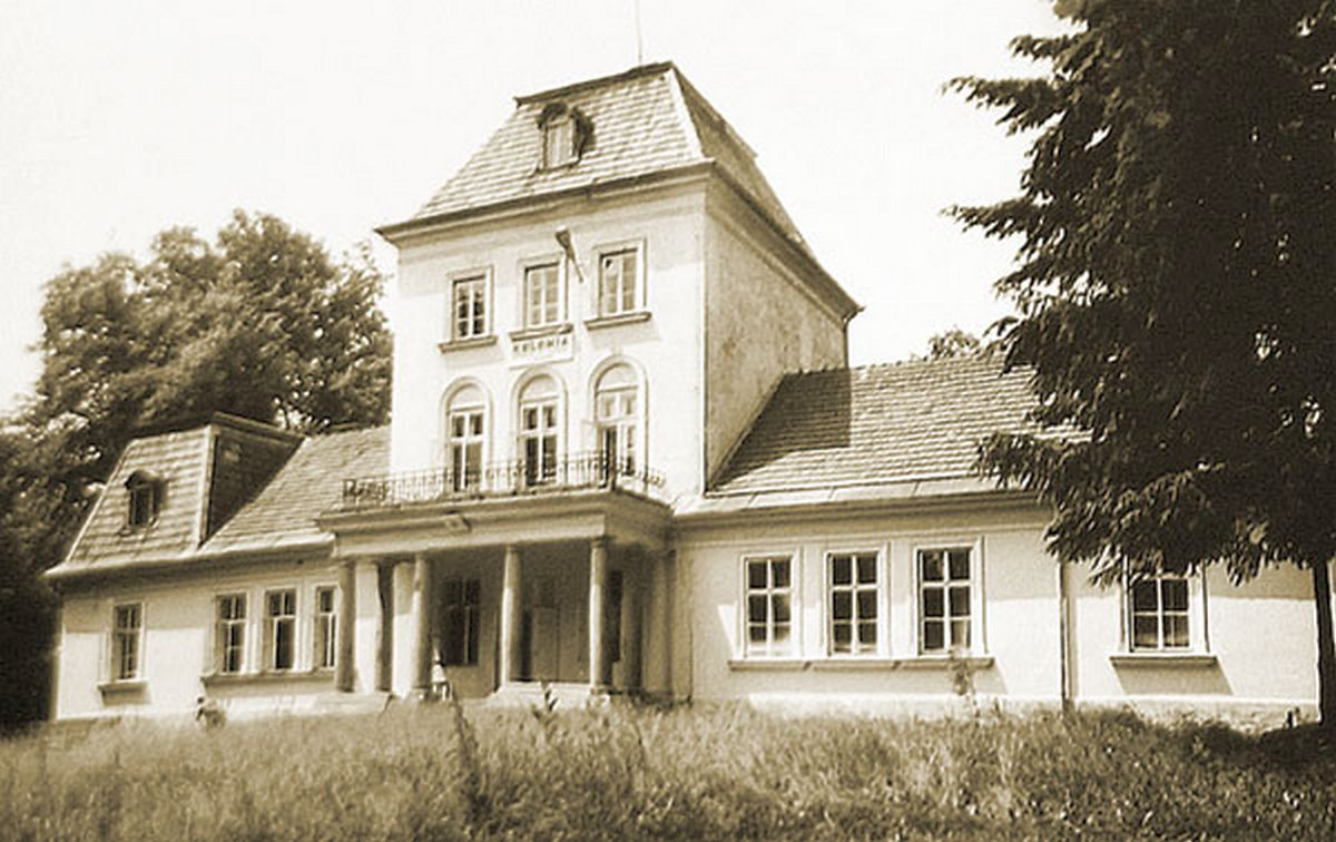 Dwór Sieraków, część frontowa, przed przebudową w 2006 roku